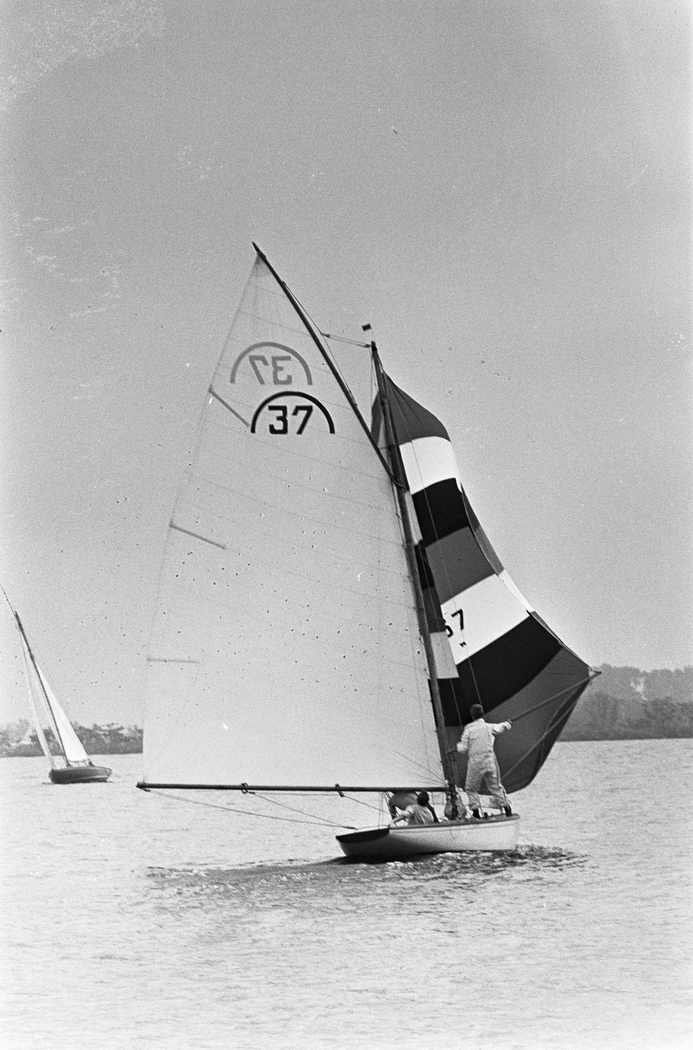 Collectie / Archief : Fotocollectie Anefo Reportage / Serie : [ onbekend ] Beschrijving : Laatste dag Kaagweek, Regenboog no. 37 van scheepsbouwer Bouke van Wijk Datum : 22 juli 1965 Trefwoorden : zeilen Persoonsnaam : Bouke van Wijk Instellingsnaam : Kaagweek Fotograaf : Koch, Eric / Anefo Auteursrechthebbende : Nationaal Archief Materiaalsoort : Negatief (zwart/wit) Nummer archiefinventaris : bekijk toegang 2.24.01.05 Bestanddeelnummer : 917-9876